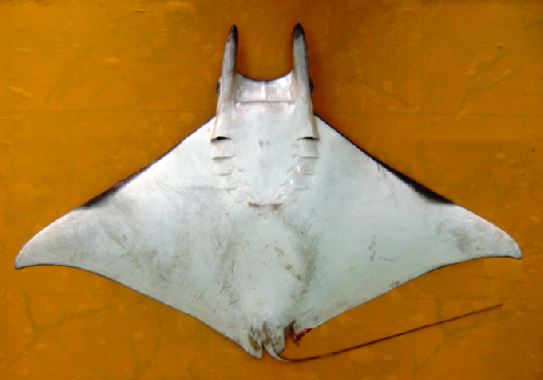 скат рода мобул